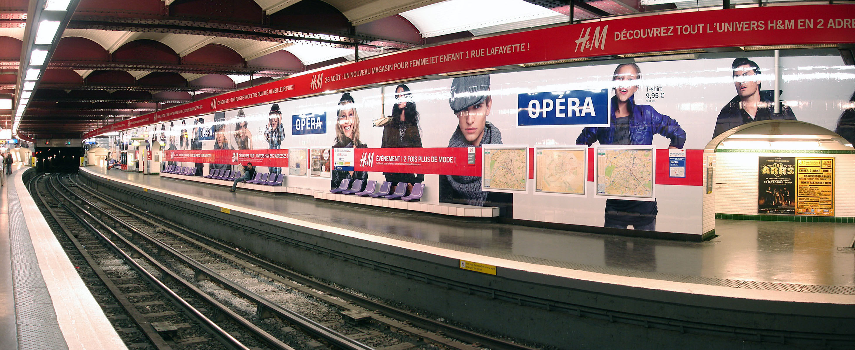 Station Opéra, de la ligne 3 du métro de Paris, France.